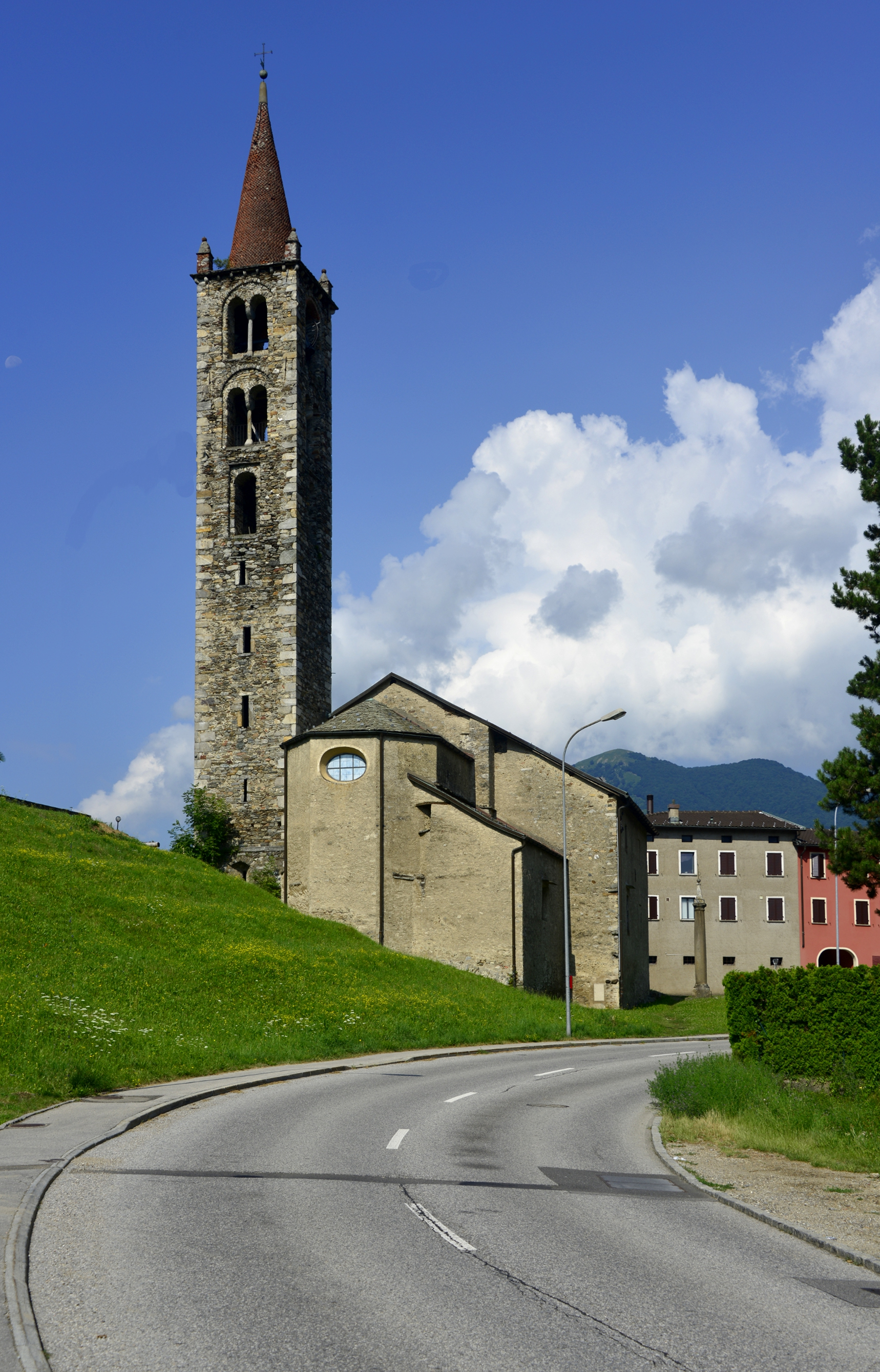 Chiesa di Sant'Antonio Abata a Sala Capriasca